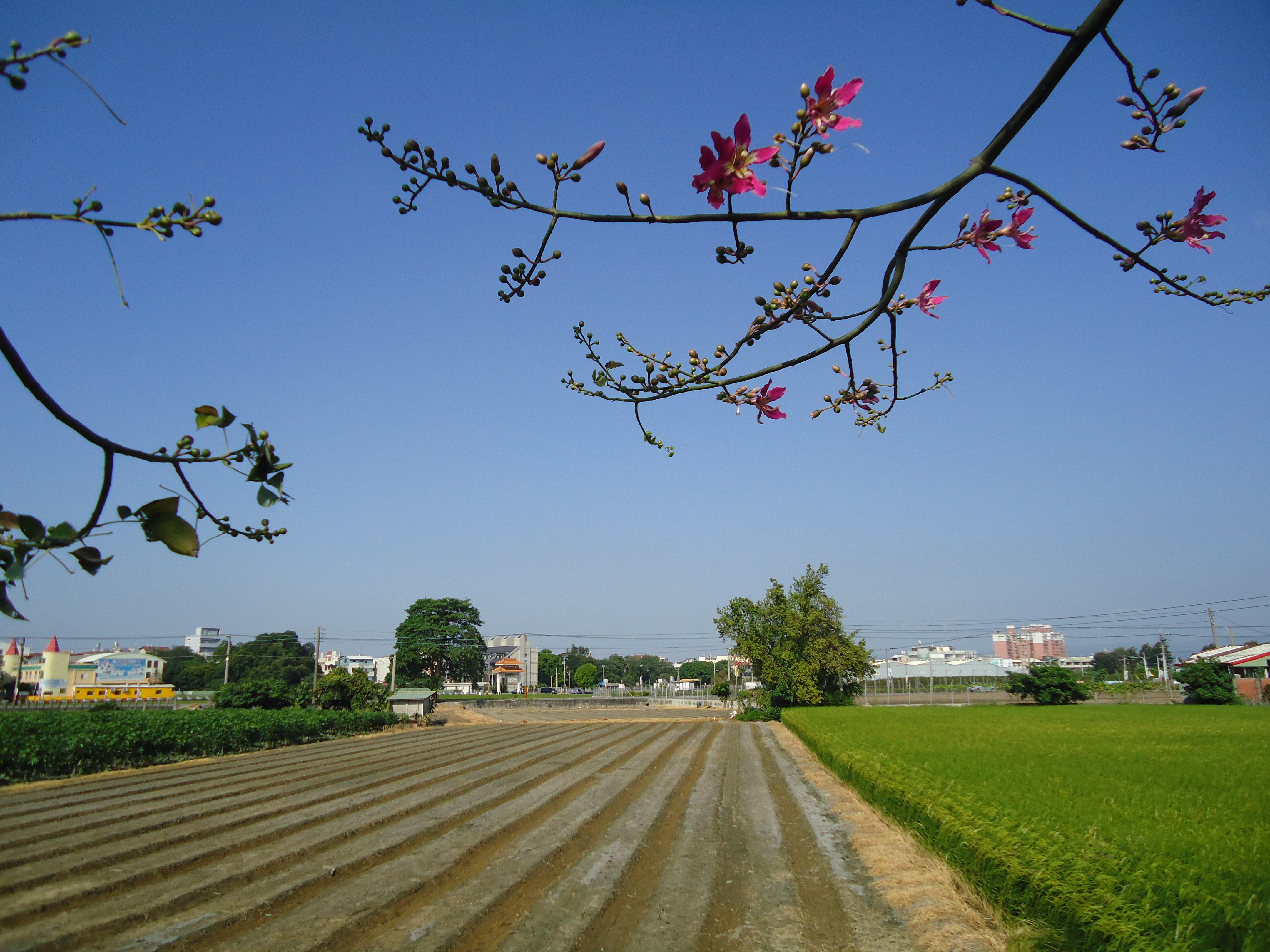 北斗農村風光